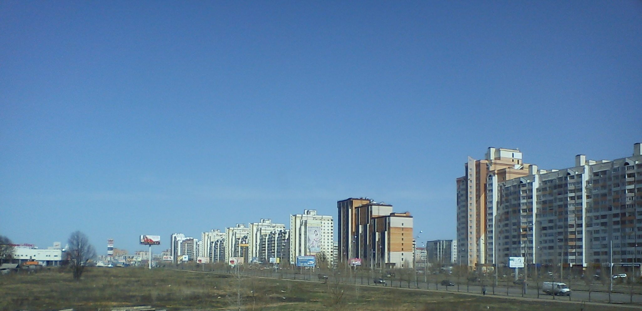 Проспект Победы в Казани